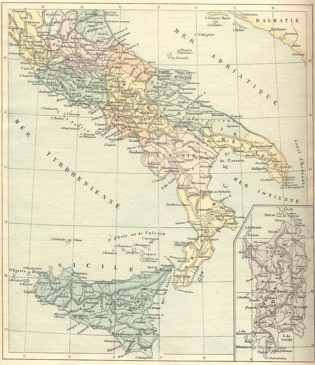 Atlas de Géographie ancienne de L. Carrez de 1886